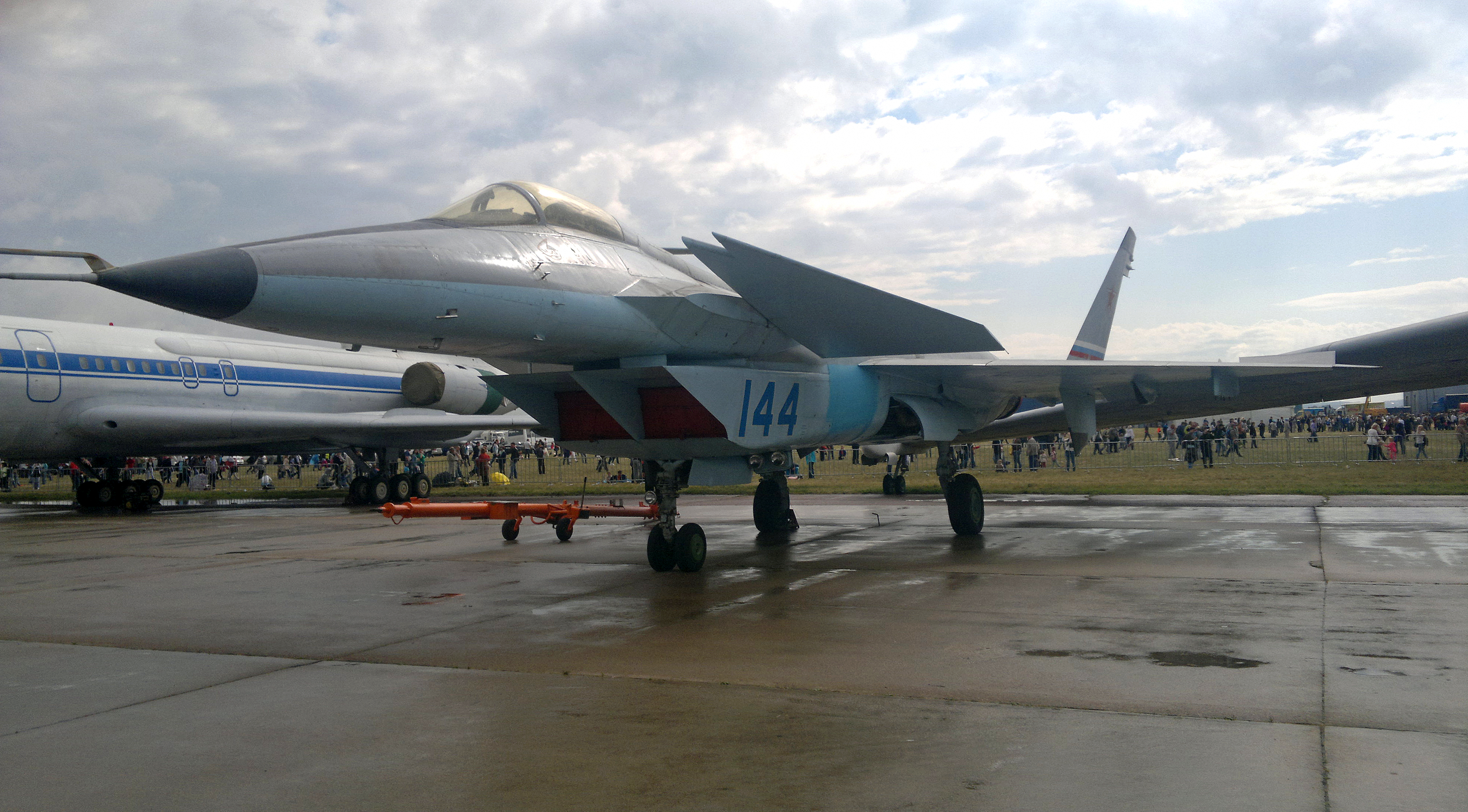 MiG144 left side